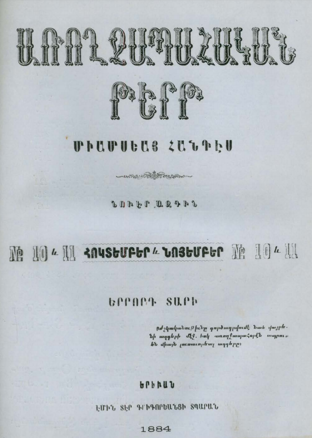 «Առողջապահական թերթ»ի առաջին էջը 1884 թ. #10 և 11 համարից